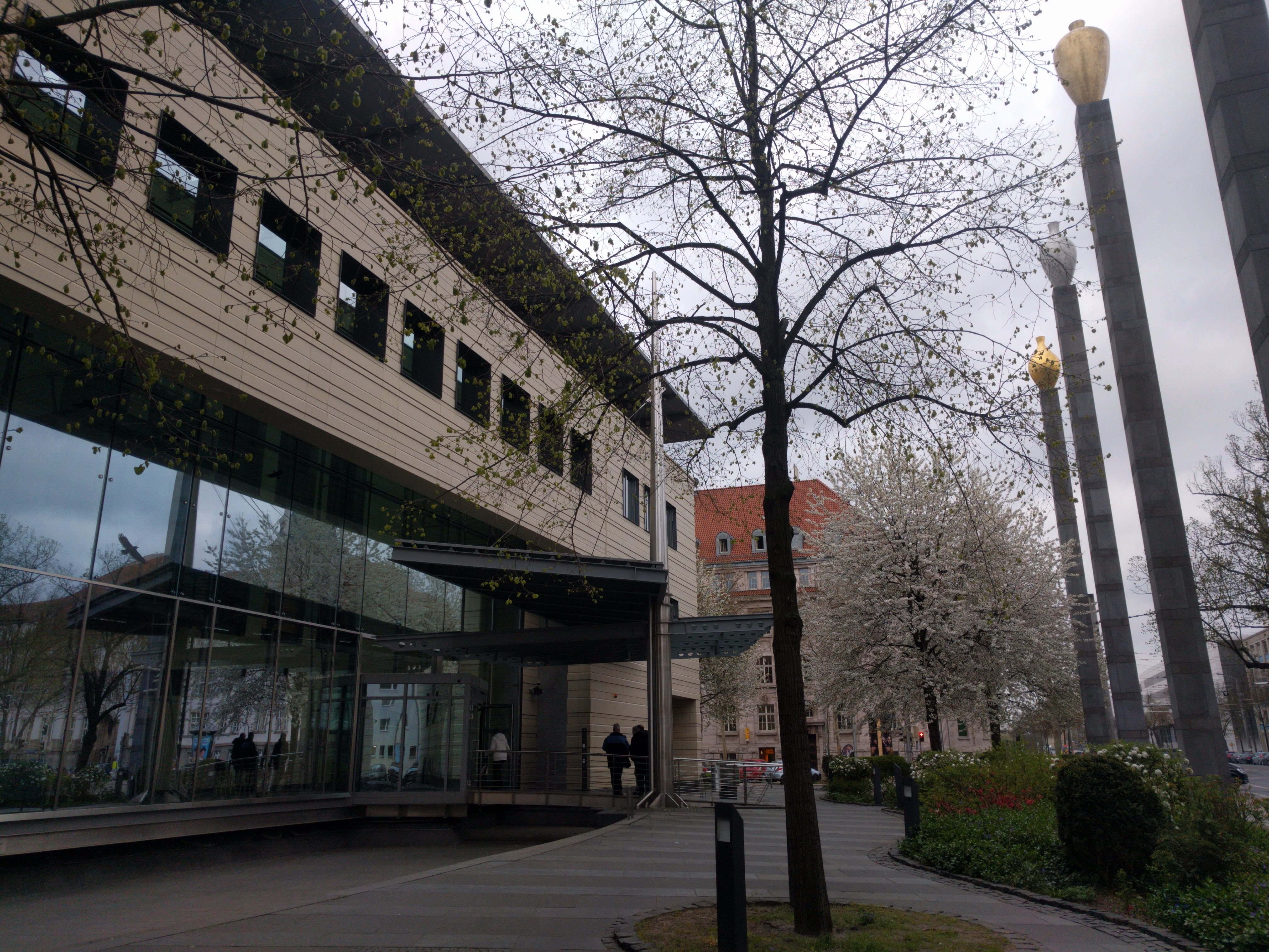 Deutsche Bundesbank - Filiale Leipzig